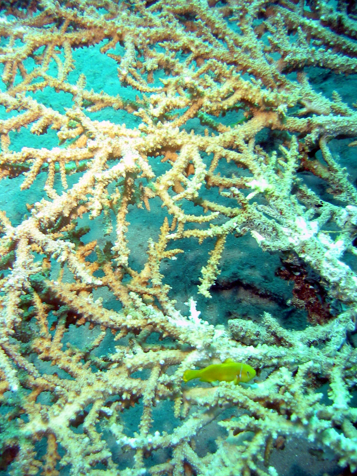 Taba 2007